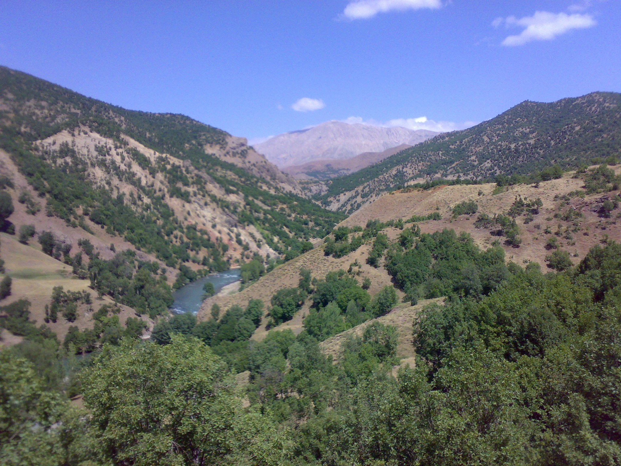 Tunceli/Ovacik